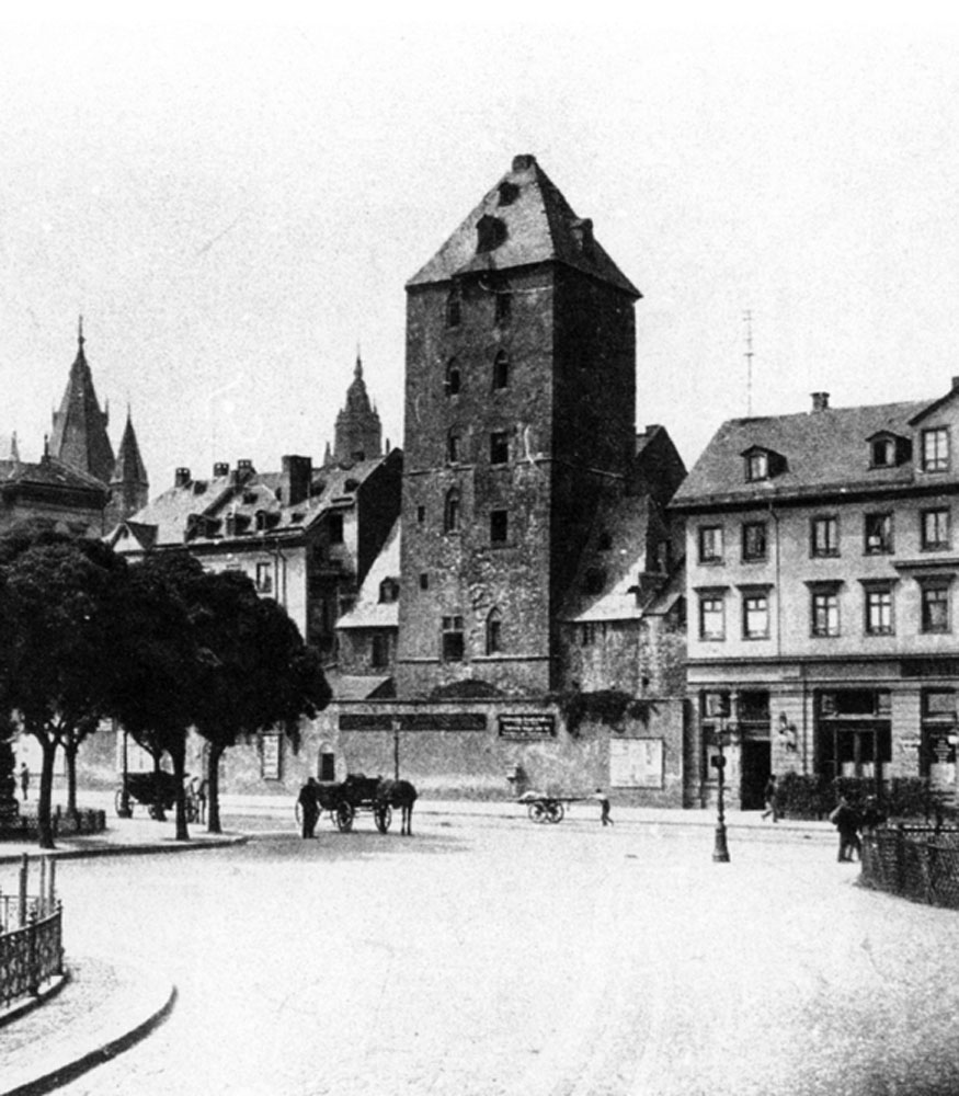 Eisenturm in Mainz mit Umbauung von der Stadthalle aus fotografiert.